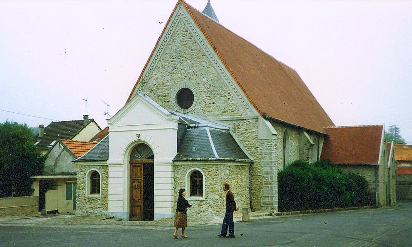 kościół katolicki w Gretz-Armainvilliers